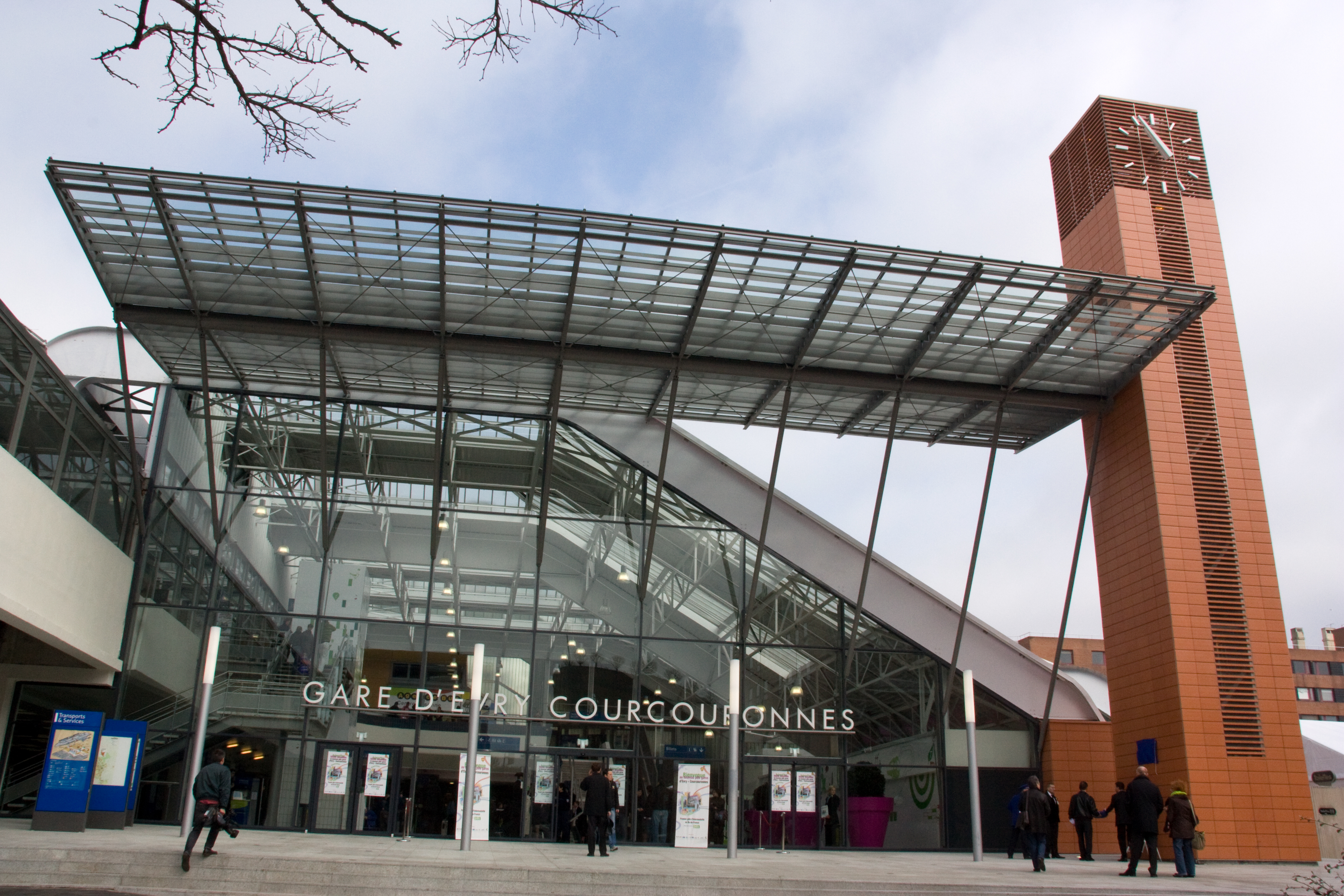 Gare d'Evry-Courcouronnes à Évry (Essonne, France).